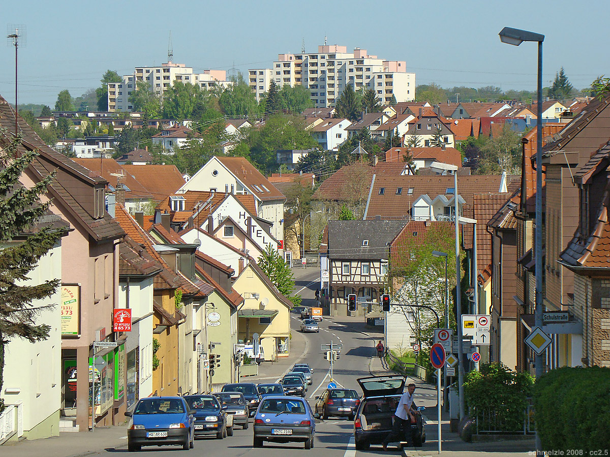 Blick über Heilbronn-Frankenbach, Blick längs der Saarbrücker Straße nach Nordwesten, im Bildmittelpunkt Ortsmitte mit Fachwerkbau Gasthaus Stern, dahinter Neubaugebiet Maihalde